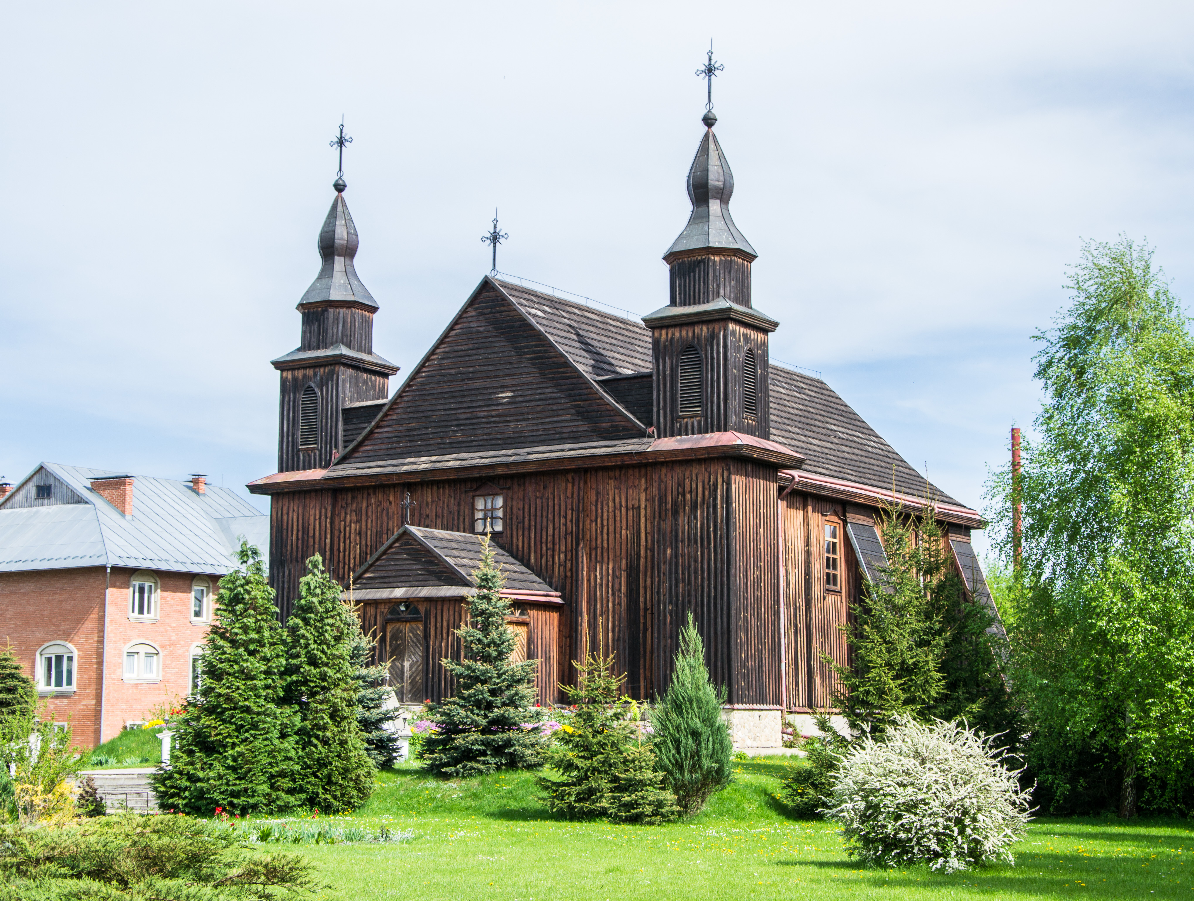 Костел святої Анни (дер.) з с. Вишеньки Рожищенського району, Ковель, вул. Вербицького, 1а